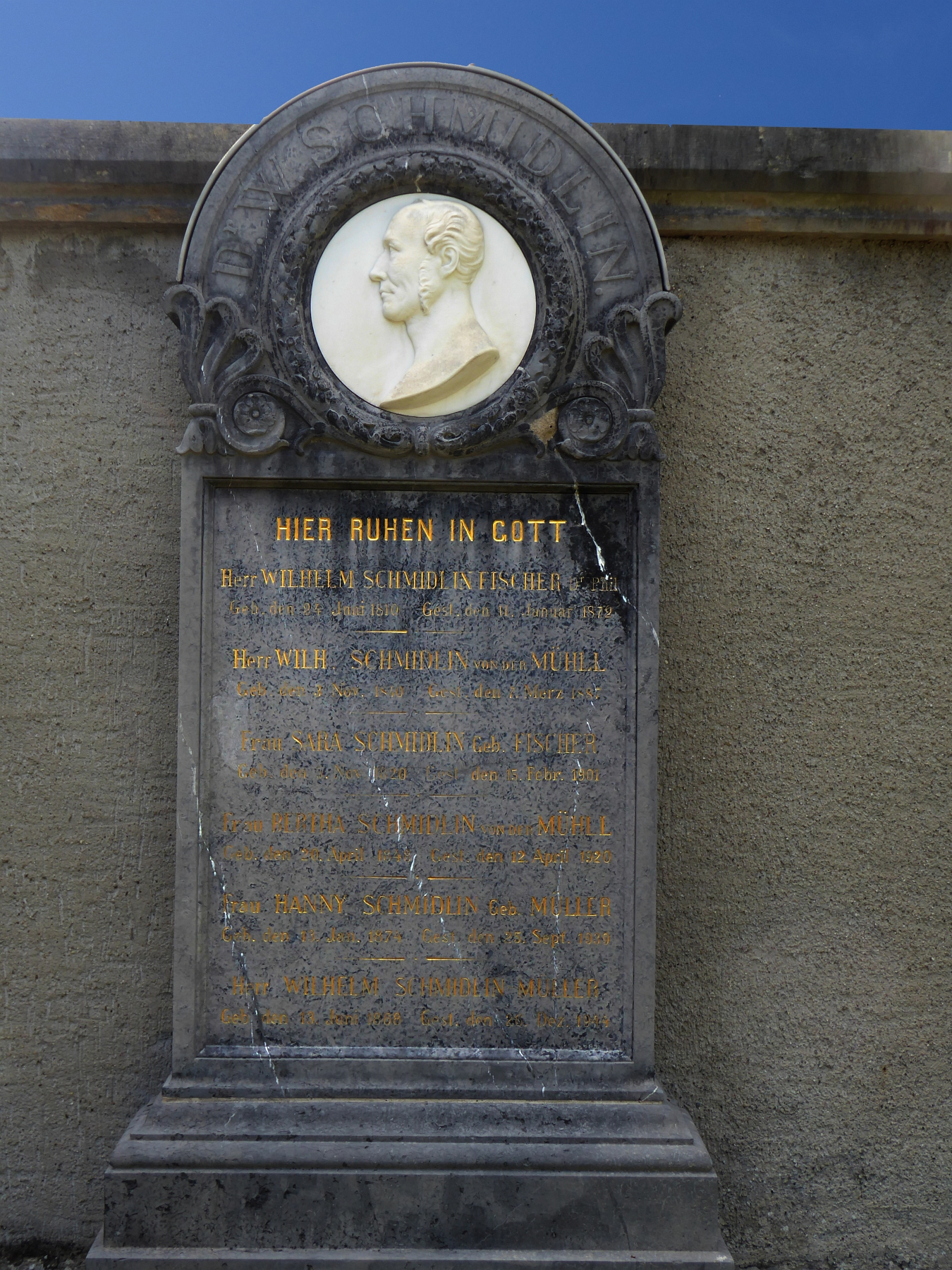 Heinrich Rudolf Meili, Grabmalmedaillon auf dem Friedhof Wolfgottesacker für Wilhelm Schmidlin-Fischer (1810–1872) Dr.phil., Centralbahn Direktor, Basel.